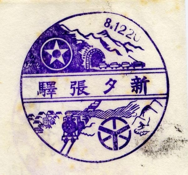 新夕張駅スタンプ・1933年/ooyubari9201所有